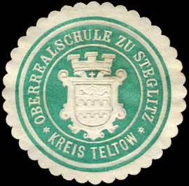 Sealing stamp Title: Oberrealschule zu Steglitz - Kreis Teltow Description: grün, weiß, geprägt Place: Steglitz size: 4 cm